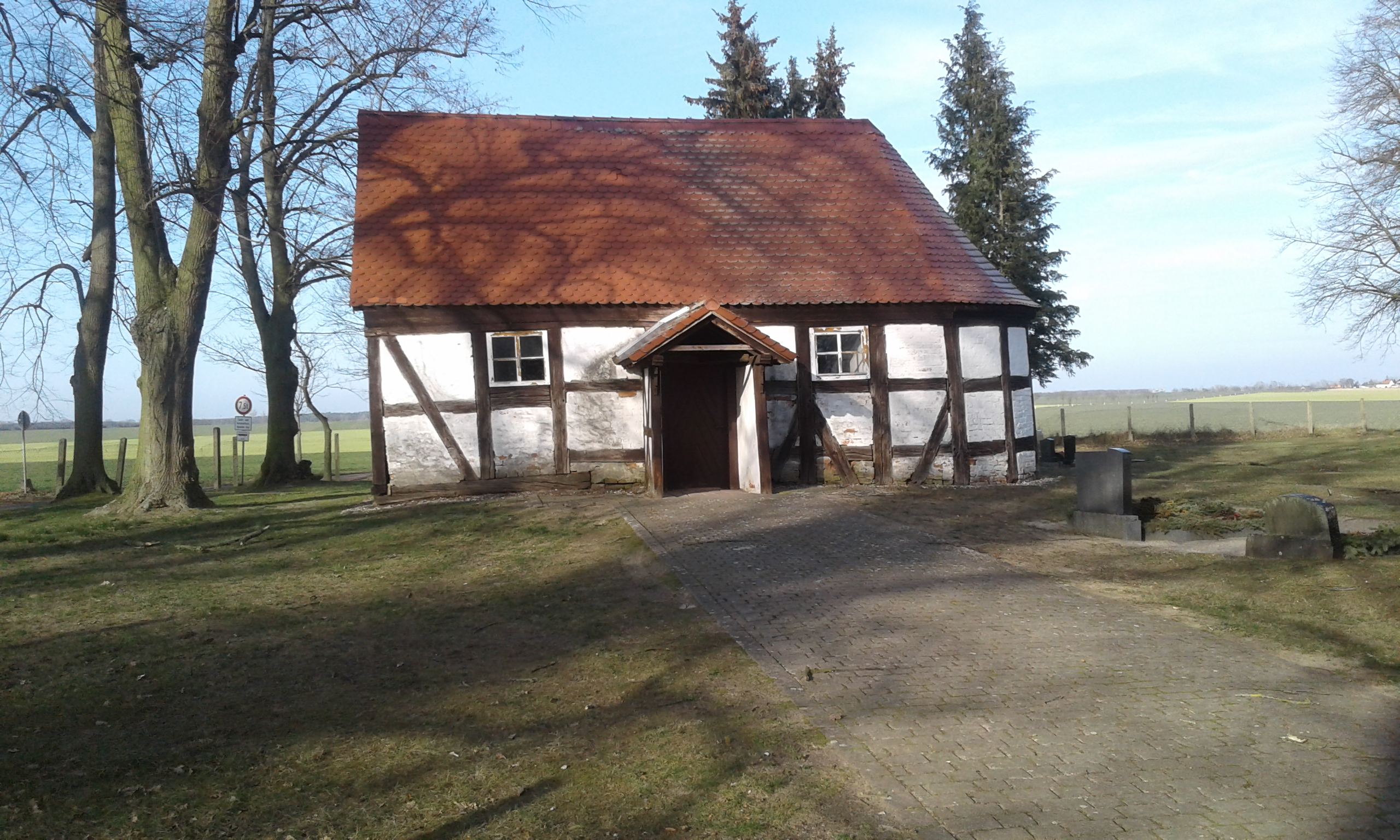 Kapelle